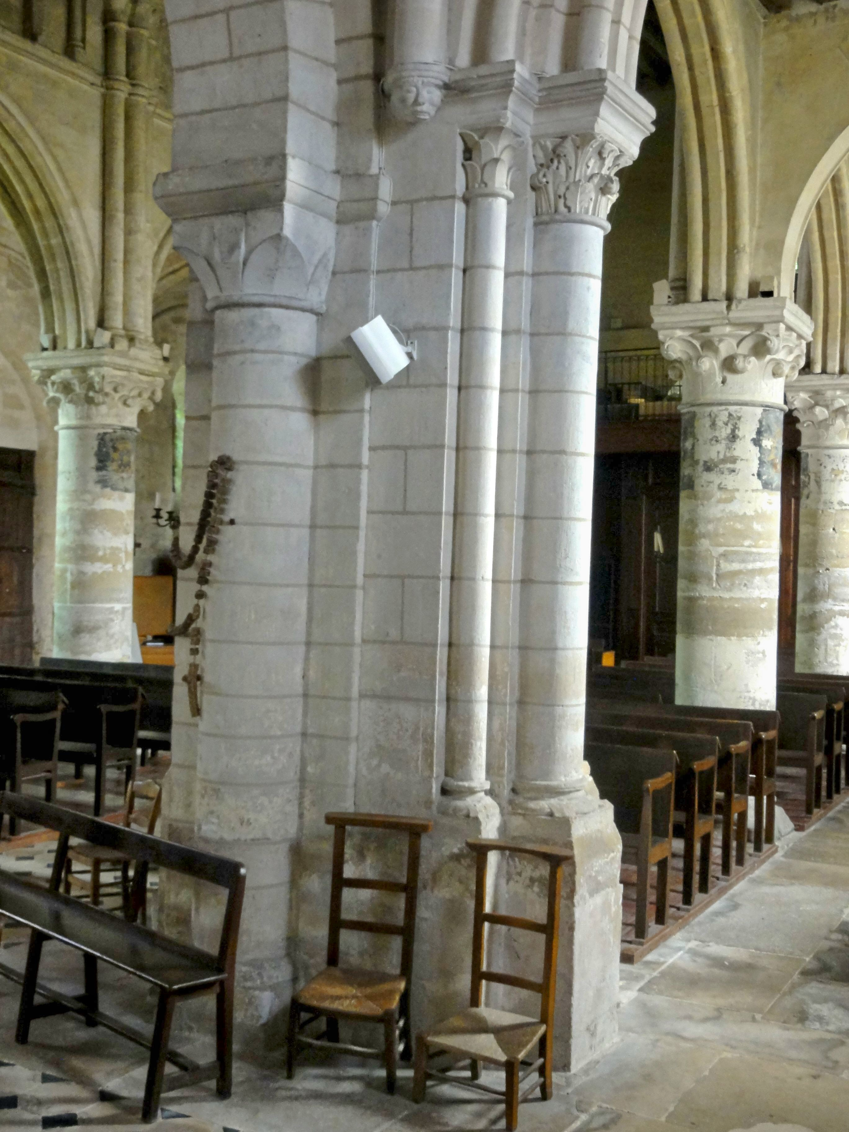 Pile nord-ouest du clocher, côté nord-est (vue depuis l'ancien croisillon nord).